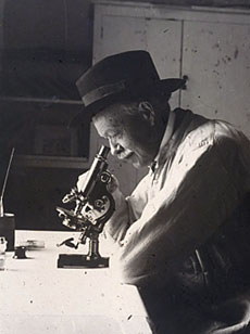 Charles Nicolle devant son microscope